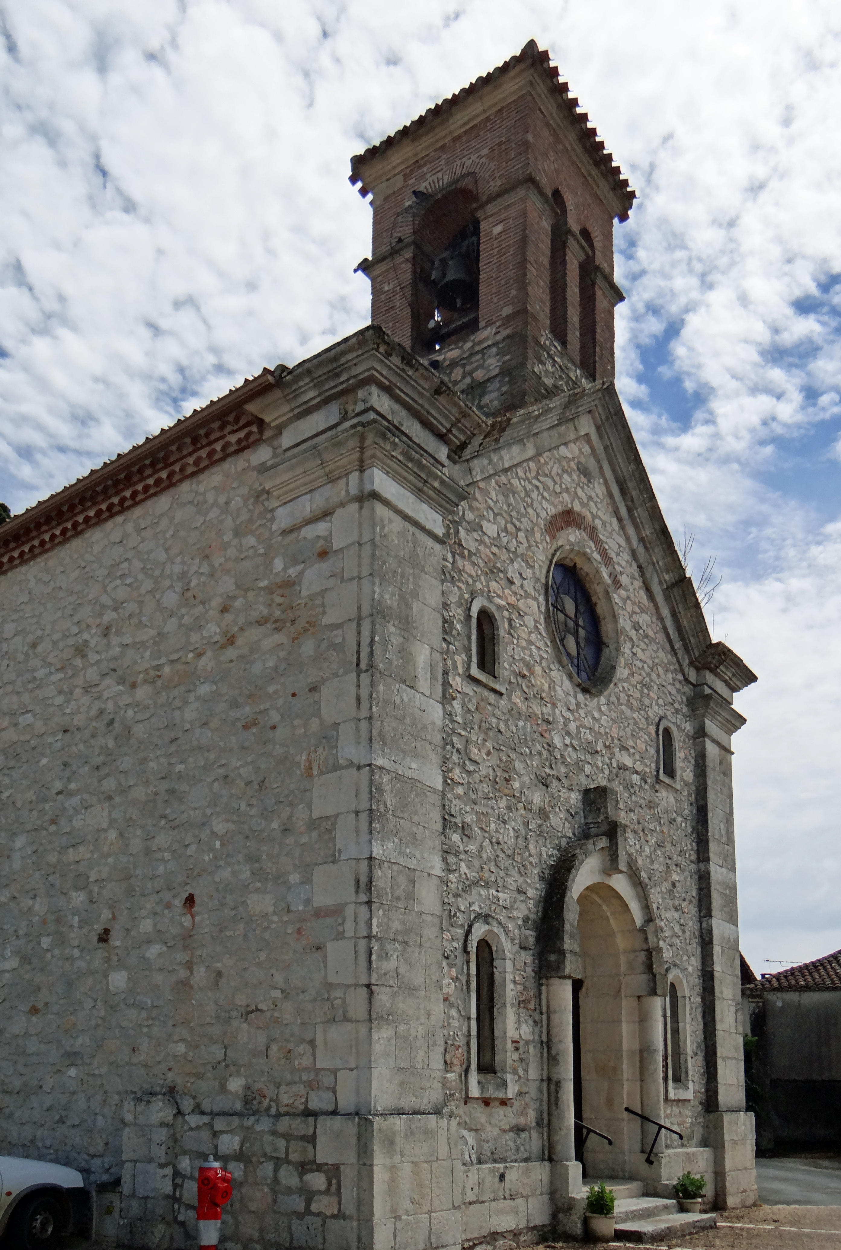 Saint-Georges (Lot-et-Garonne) - L'église